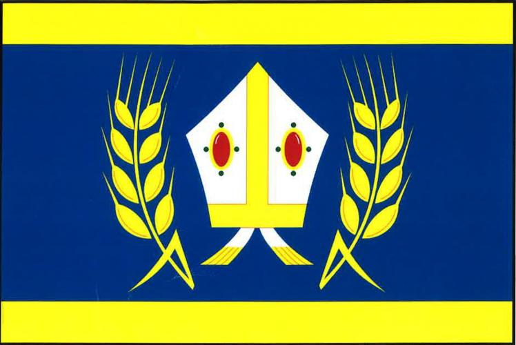 Bubovice vlajka